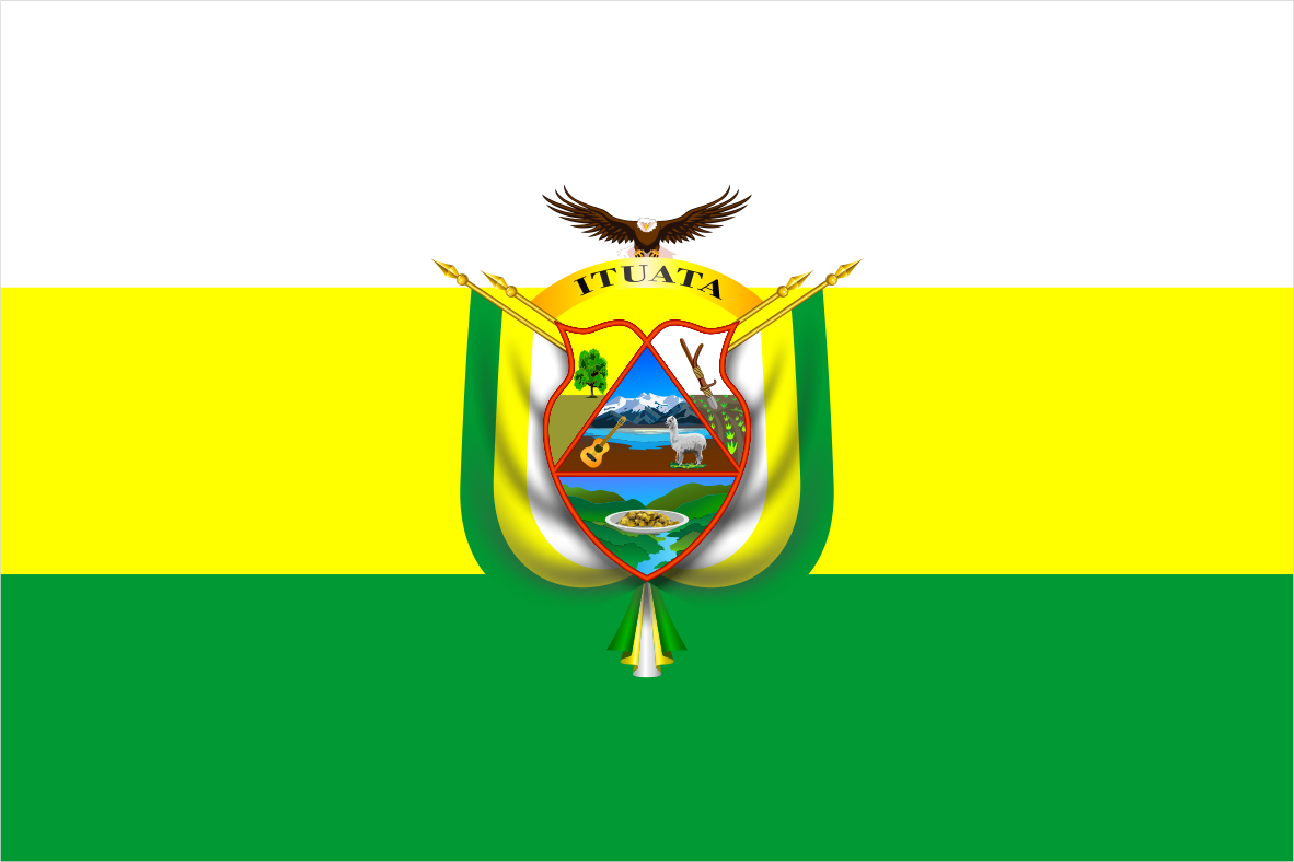 LA BANDERA DE ITUATA: BLANCO, AMARILLO, VERDE. Está formada por tres franjas horizontales de igual anchura, colocadas de arriba hacia abajo en el siguiente orden: Blanco, Amarillo, Verde. El color BLANCO simboliza la paz y la tranquilidad de un pueblo unido, dedicado al trabajo que redime y dignifica al hombre. El color AMARILLO significa la madurez de sus abundantes frutos, la riqueza de su suelo y el oro que abunda en el subsuelo, lo mismo que en el corazón y en el espíritu de sus hijos, para hacer de este pueblo un centro de laboriosidad, cultura y de progreso. El color VERDE: simboliza el color de sus campos cultivados, el verdor de sus fértiles bosques y la esperanza que mantienen siempre los ITUATEÑOS por conquistar un porvenir mejor para su pueblo mediante el trabajo, la ciencia y la cultura.